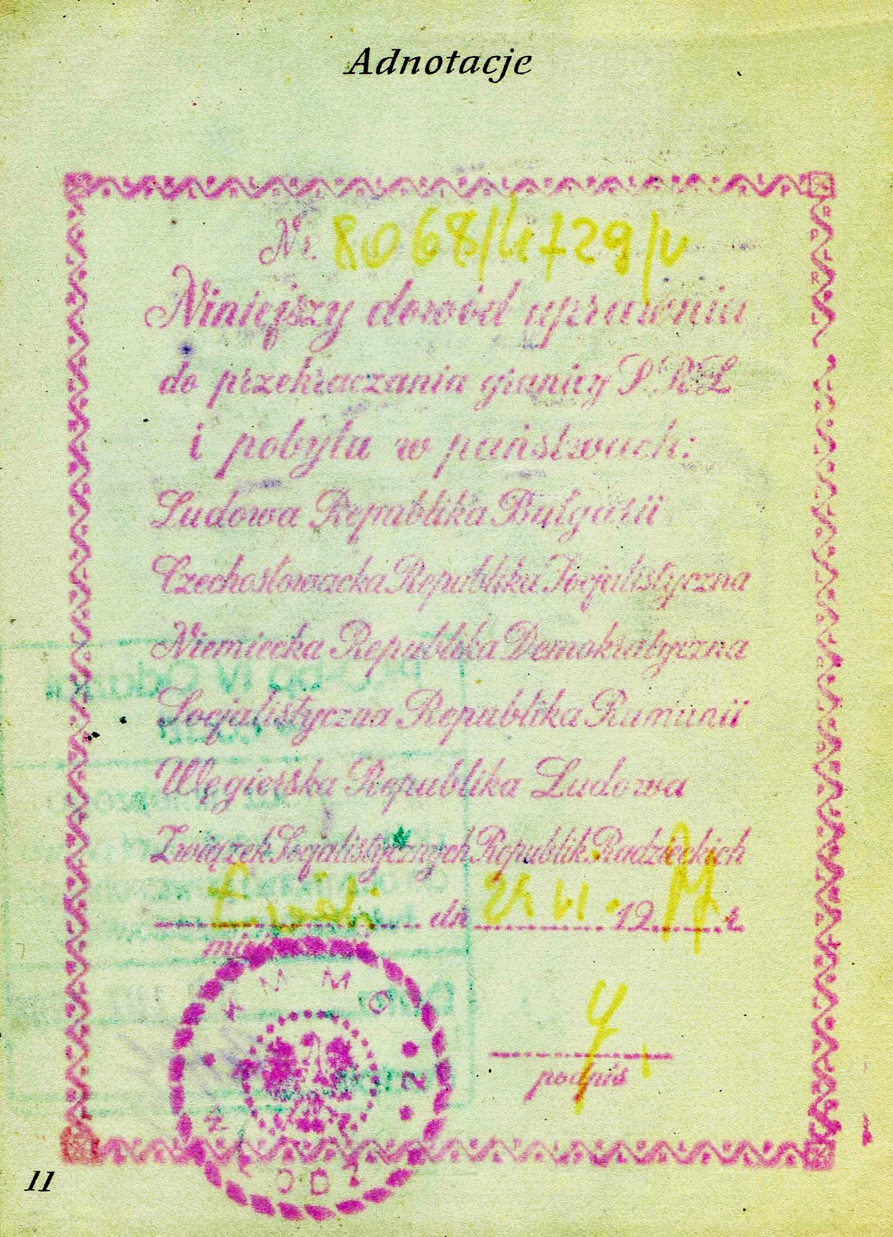 adnotacja w dowodzie osobistym o prawie przekraczania granicy z krajami socjalistycznymi